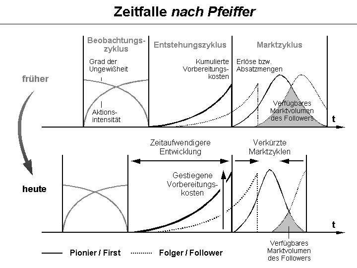 Zeitfallentheorem nach Pfeiffer, vgl. Pfeiffer, W.; Weiß, E.: Technologieorientierte Wettbewerbsstrategien, in: Corsten, H. (Hrsg.): Handbuch Produktionsmanagement. Strategie - Führung - Technologie - Schnittstellen, Wiesbaden 1994, S. 275-291, S. 281